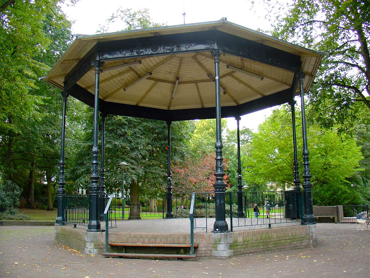 Muziekkoepel in het Houtmansplantsoen te Gouda